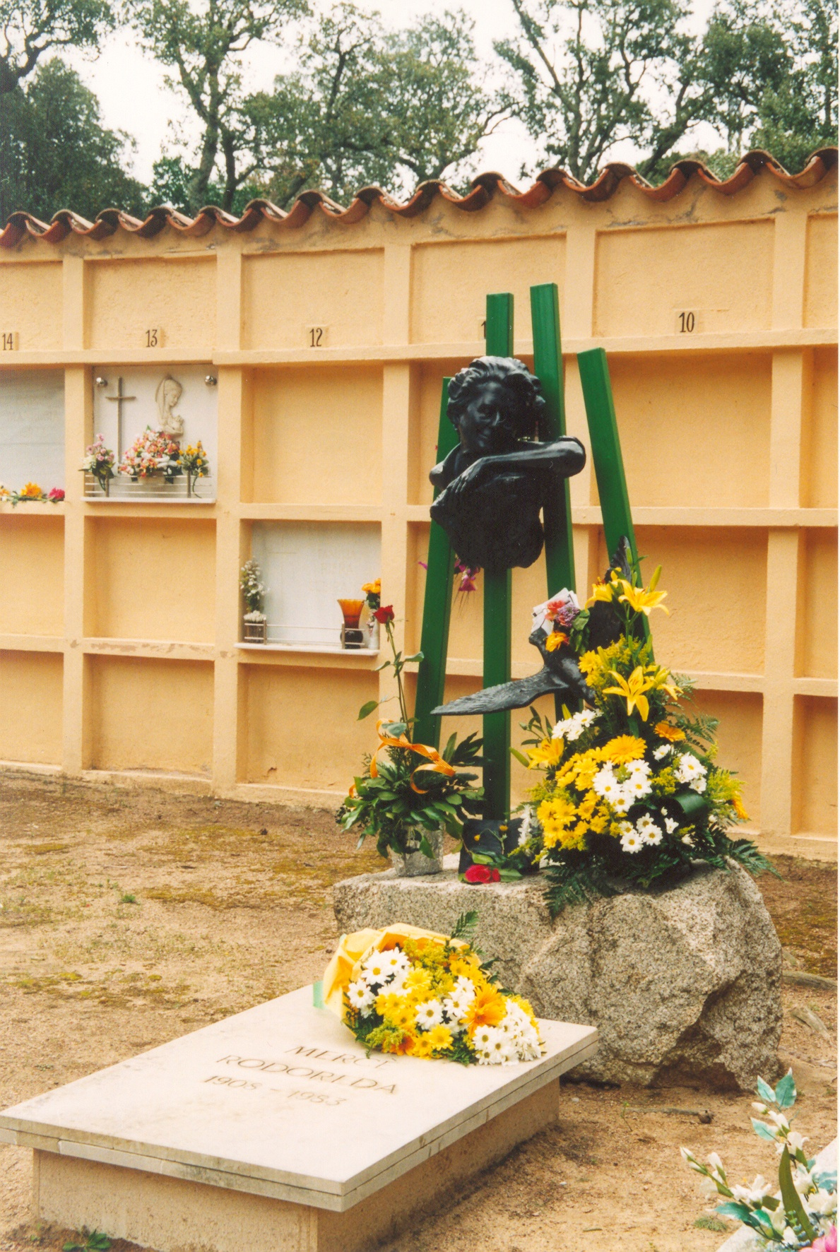 Tomba de Mercè Rodoreda al cementiri de Romanyà de la Selva, CT.